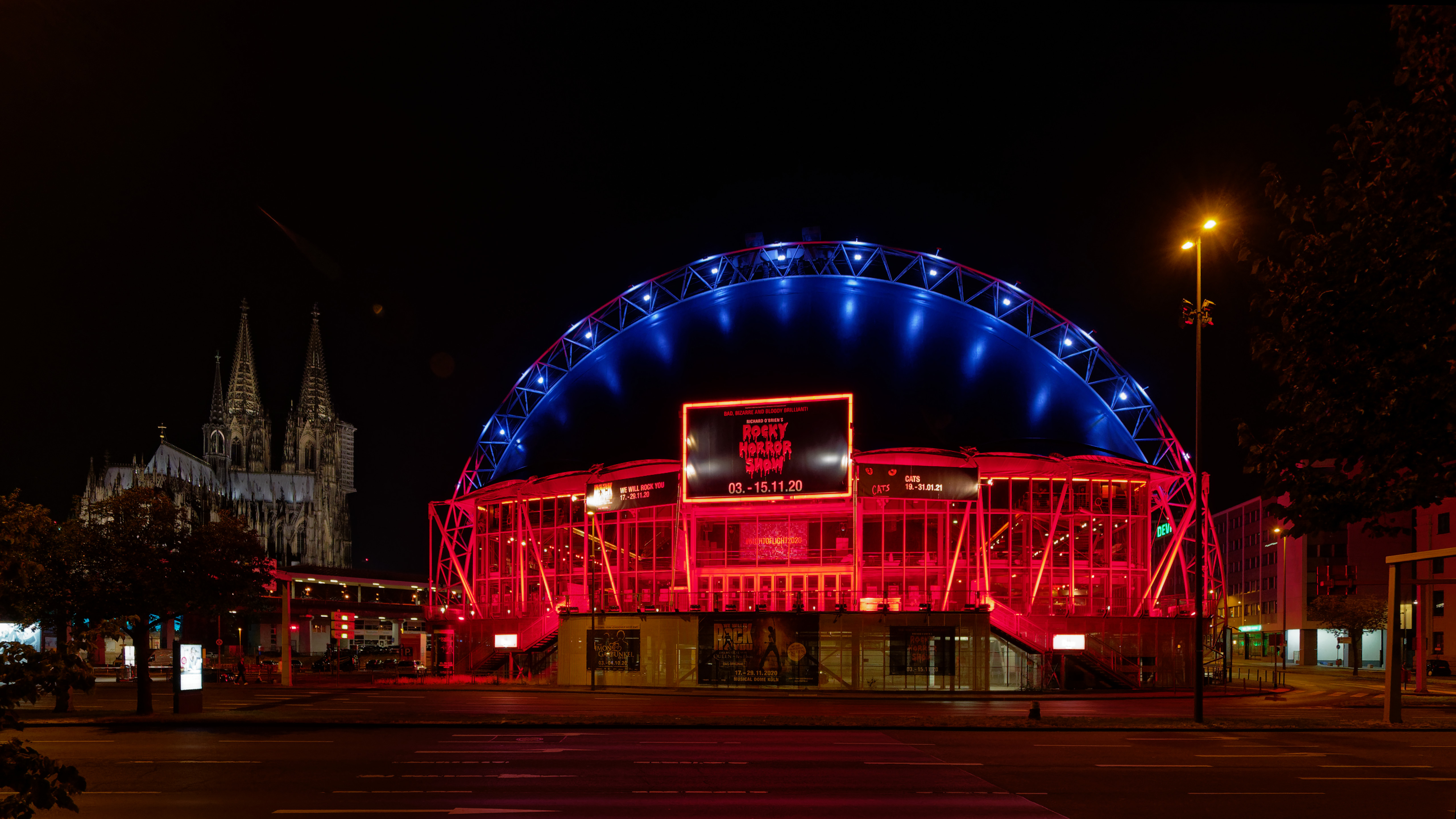 Der 'Musical Dome' in Köln wird mit roten Scheinwerfen angeleuchtet. Hierdurch soll im Rahmen der Aktion "Night of Light" auf die wirtschaftliche Situation der Verwaltungswirtschaft aufgrund der Corona Krise im Juni 2020 hingewiesen werden.